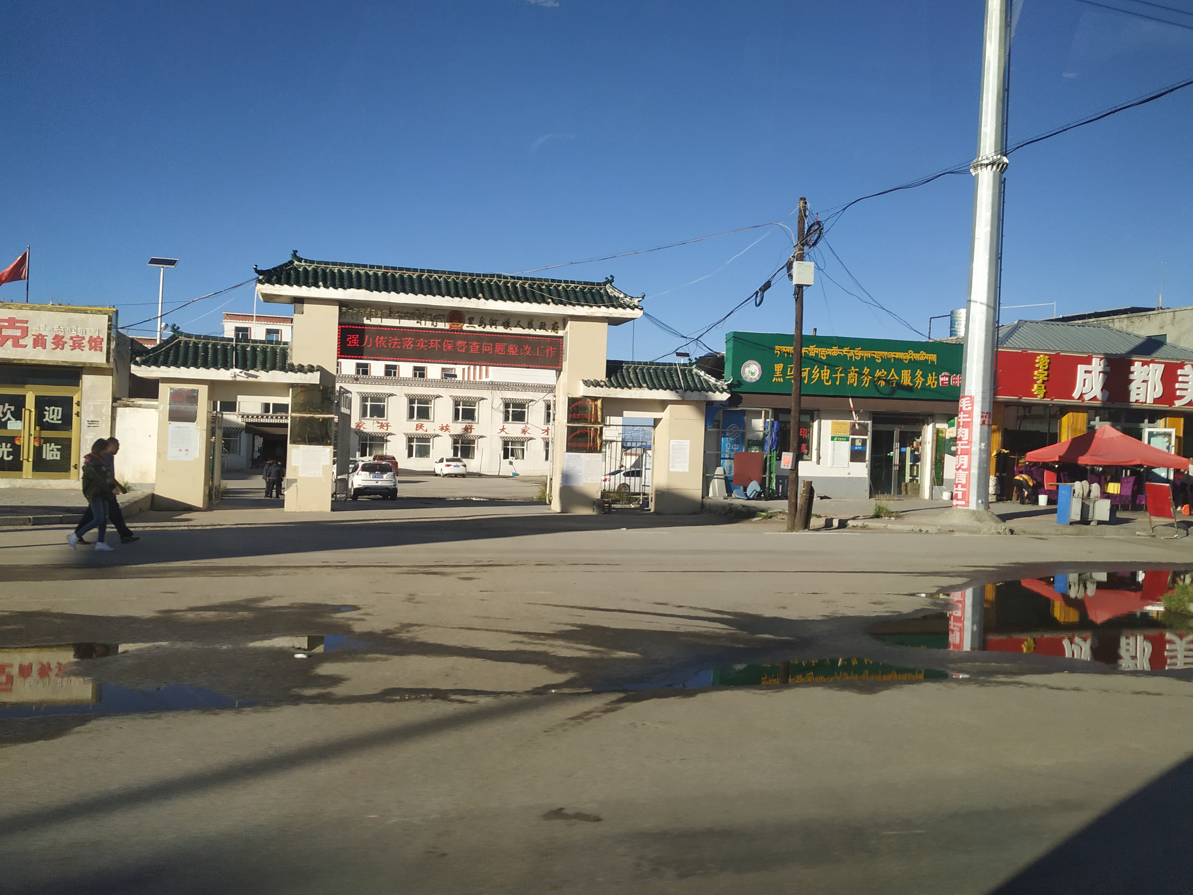 共和县黑马河